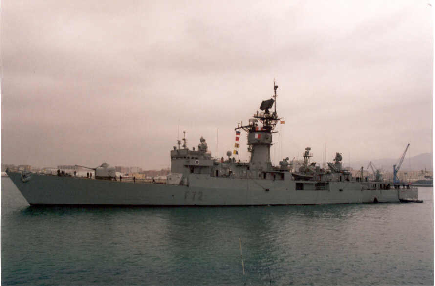 Fragata Andalucía (F-72), de la Armada Española, perteneciente a la Clase Baleares